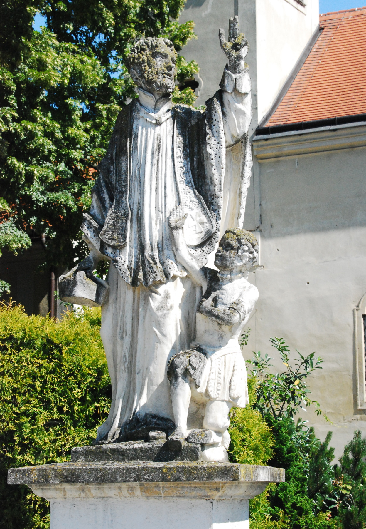 Statue des heiligen Franz Xaver vor der Kirche von Reinprechtspölla in Niederösterreich